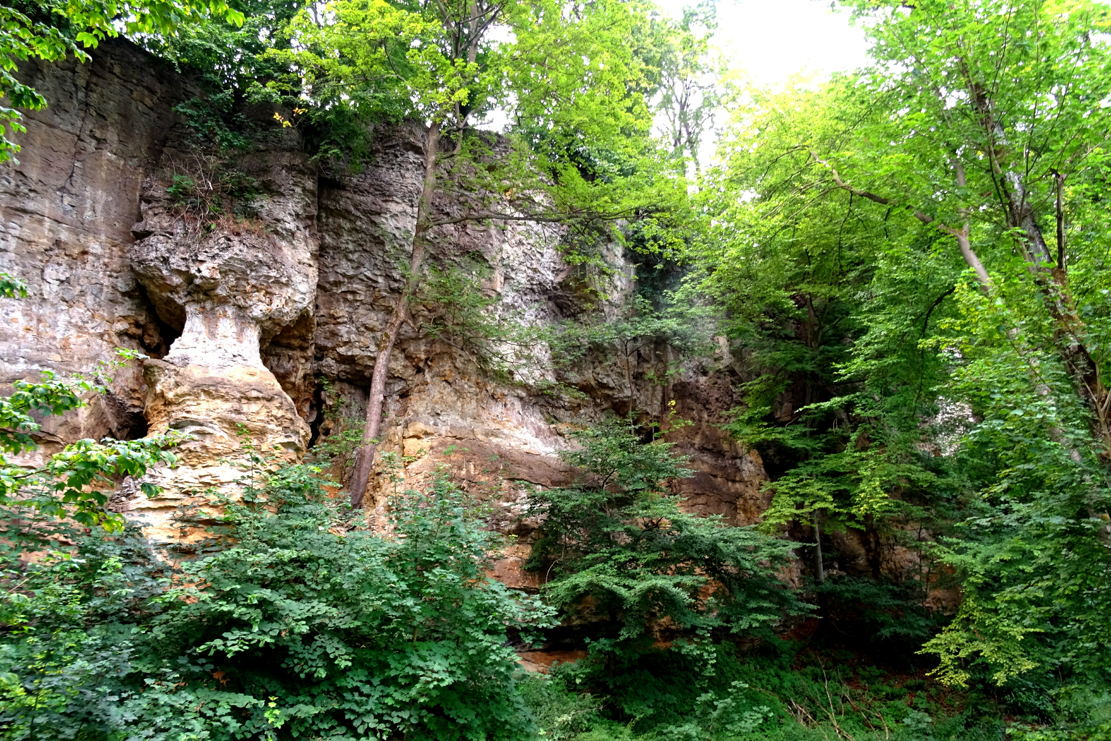 HA 025 Naturschutzgebiet Saupark